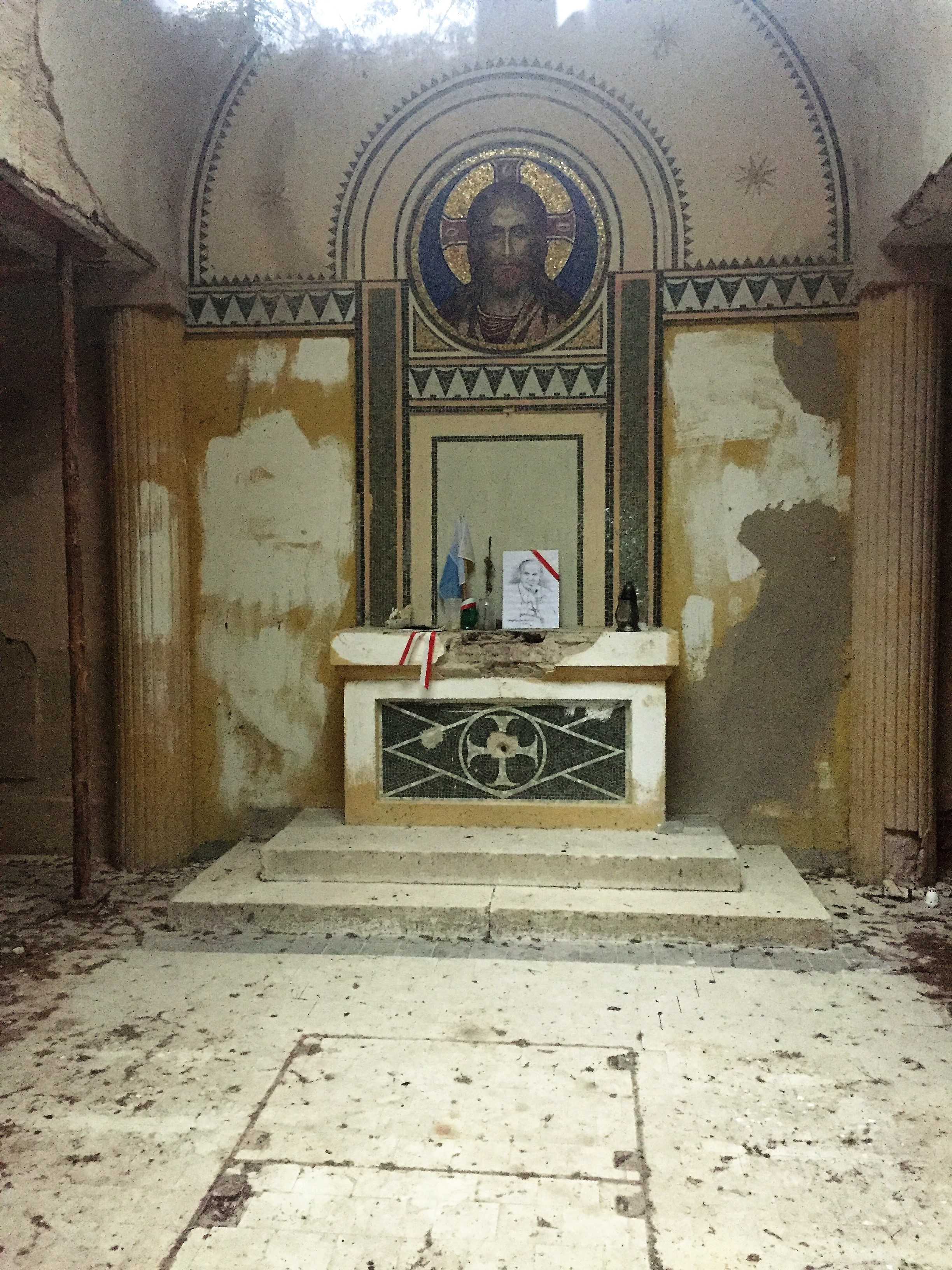 Turkowo - mauzoleum rodziny von Stich, pocz. XX (wnętrze)